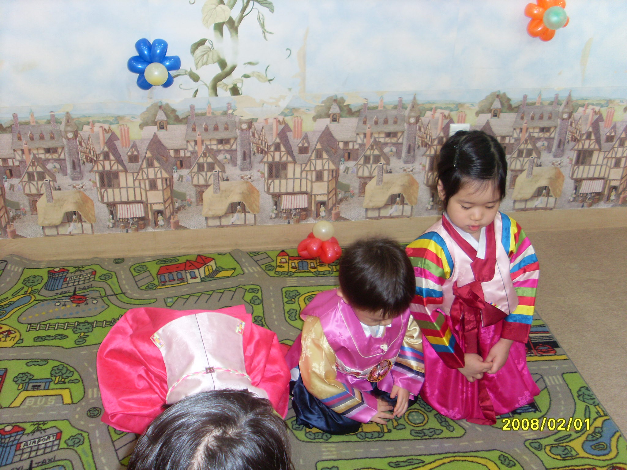 中文（香港）: 韓國新年的歲拜